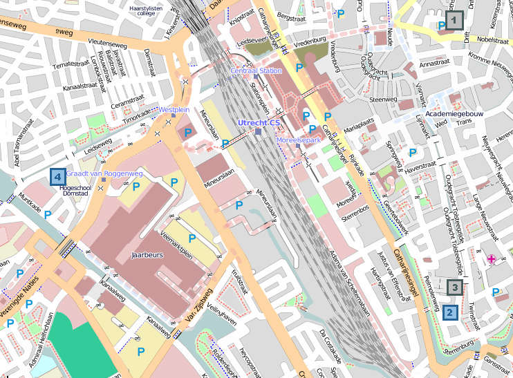 Locaties van het Christelijk Gymnasium Utrecht door de jaren heen. In chronologische volgorde: Janskerkhof, tot de jaren '30 Diaconessenstraat (Diac), vanaf jaren '30, tot 2010 Oudegracht Koningsbergerstraat (Koni of West), vanaf 2006, nog steeds in gebruik This map may be incomplete, and may contain errors. Don't rely solely on it for navigation.